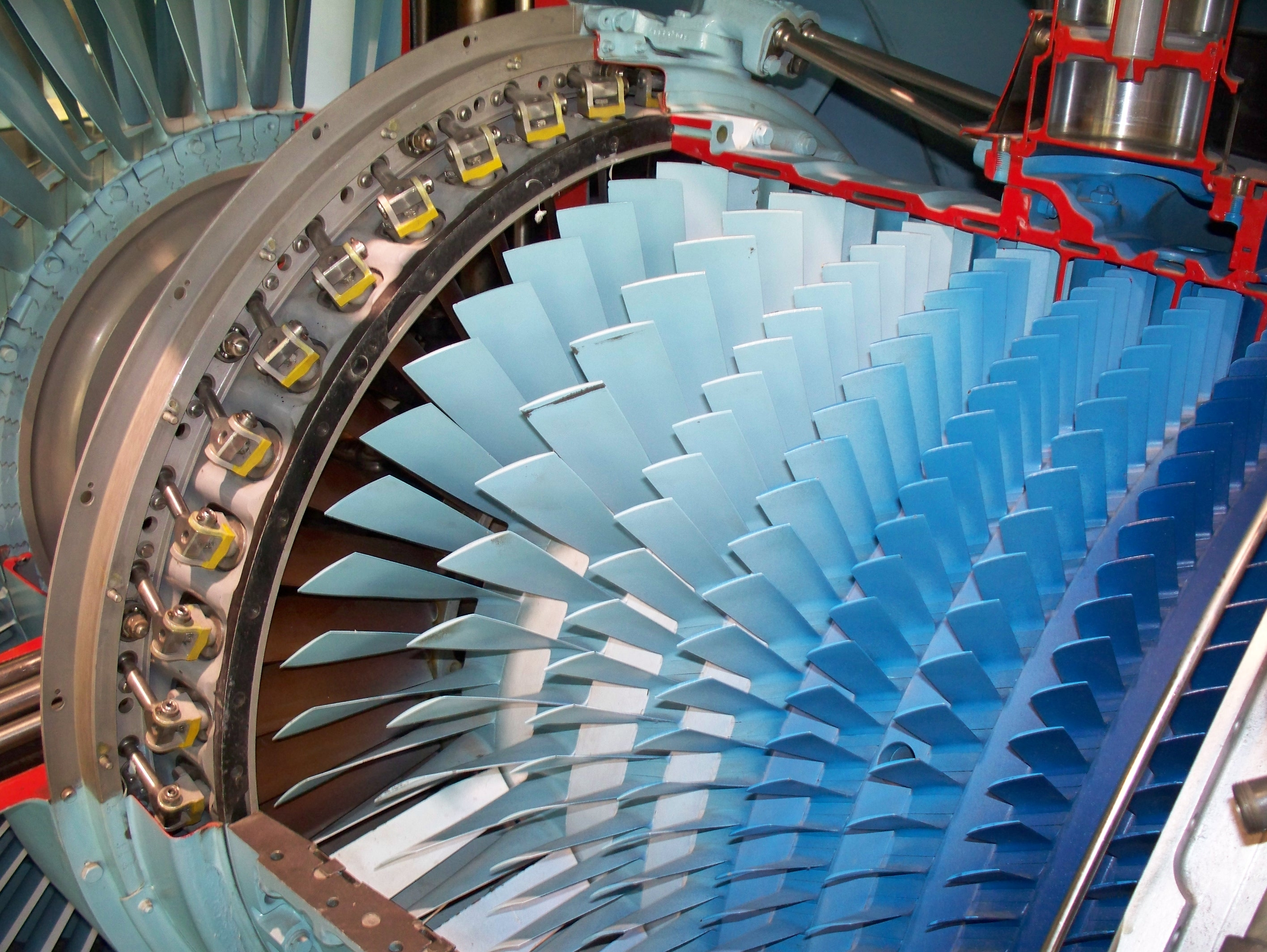 Das Triebwerk Rolls-Royce Pegasus im Deutschen Museum in München.